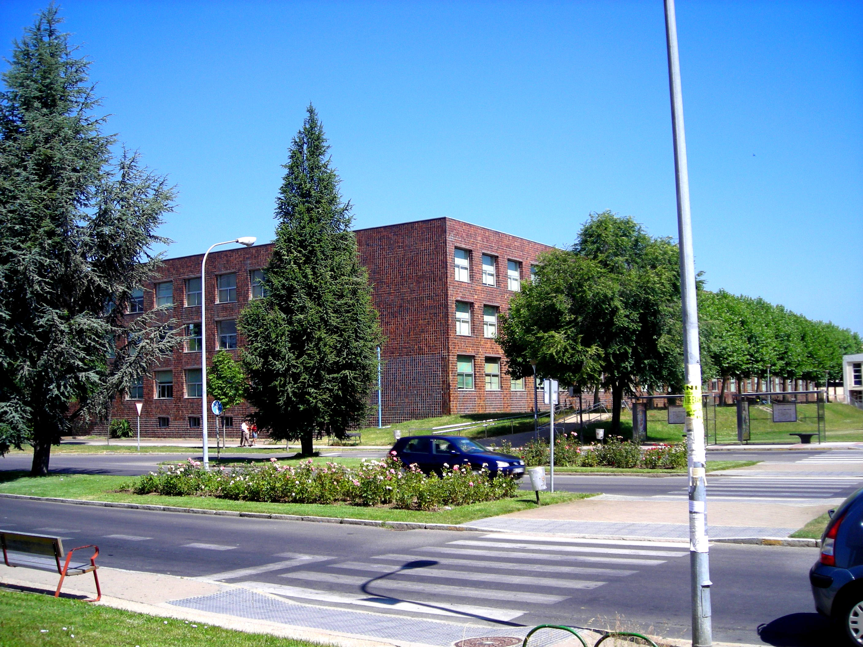 Imagen de la Facultad de Filosofía y Letras de la Universidad de León, en el campus de Vegazana